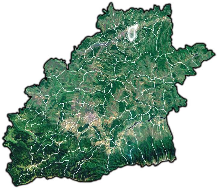 Brateiu jud Sibiu.